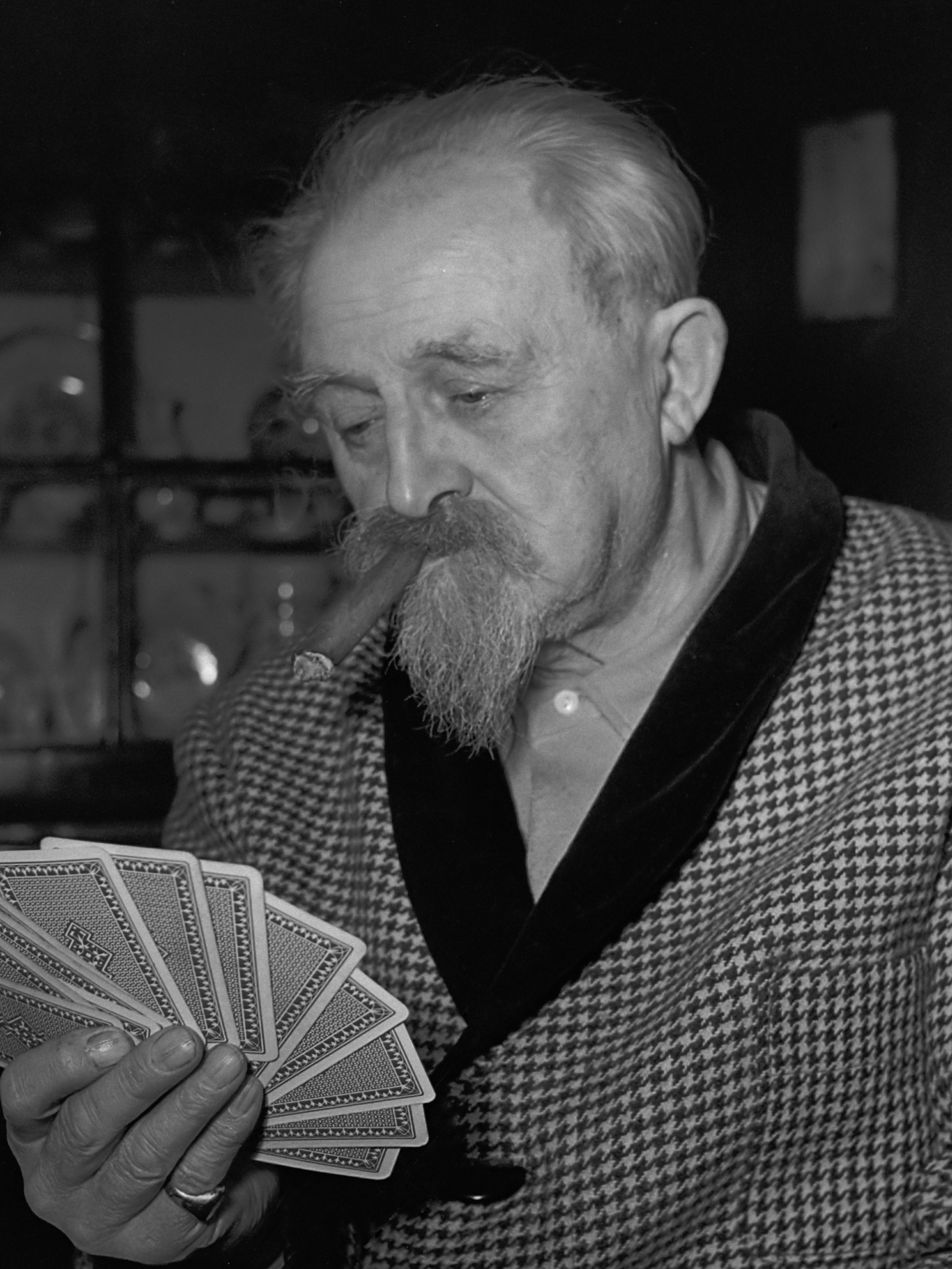 Jan Sluyters 70 jaar 12 december 1951